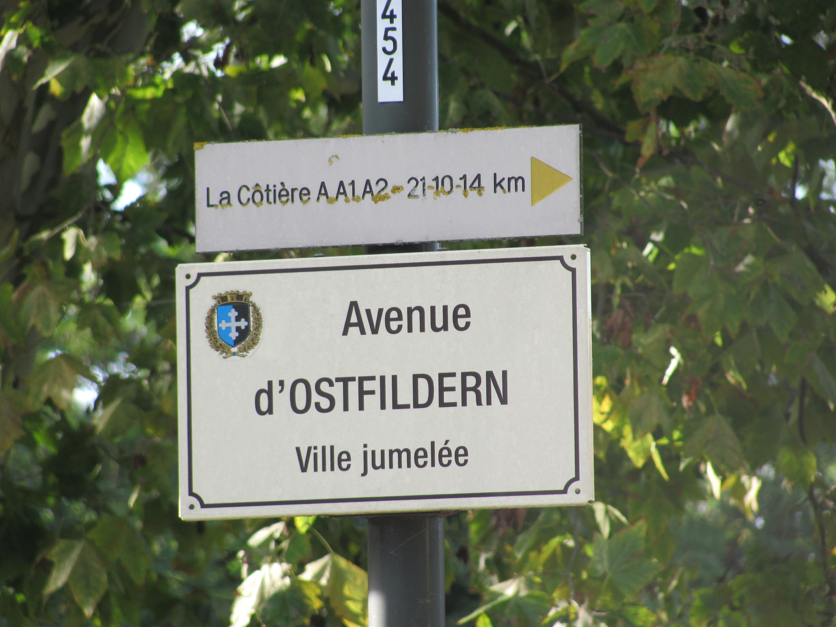 Panneau de rue de Montluel.